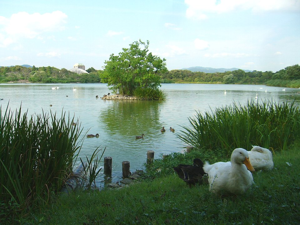 昆陽池 西岸から昆虫館を望む